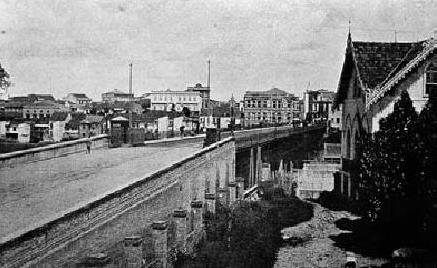 Vista do Viaduto do Chá (c. 1895). Fotografia de Gustavo Koenigswald. Acervo Biblioteca Mário de Andrade, São Paulo. Reprodução José Rosael.